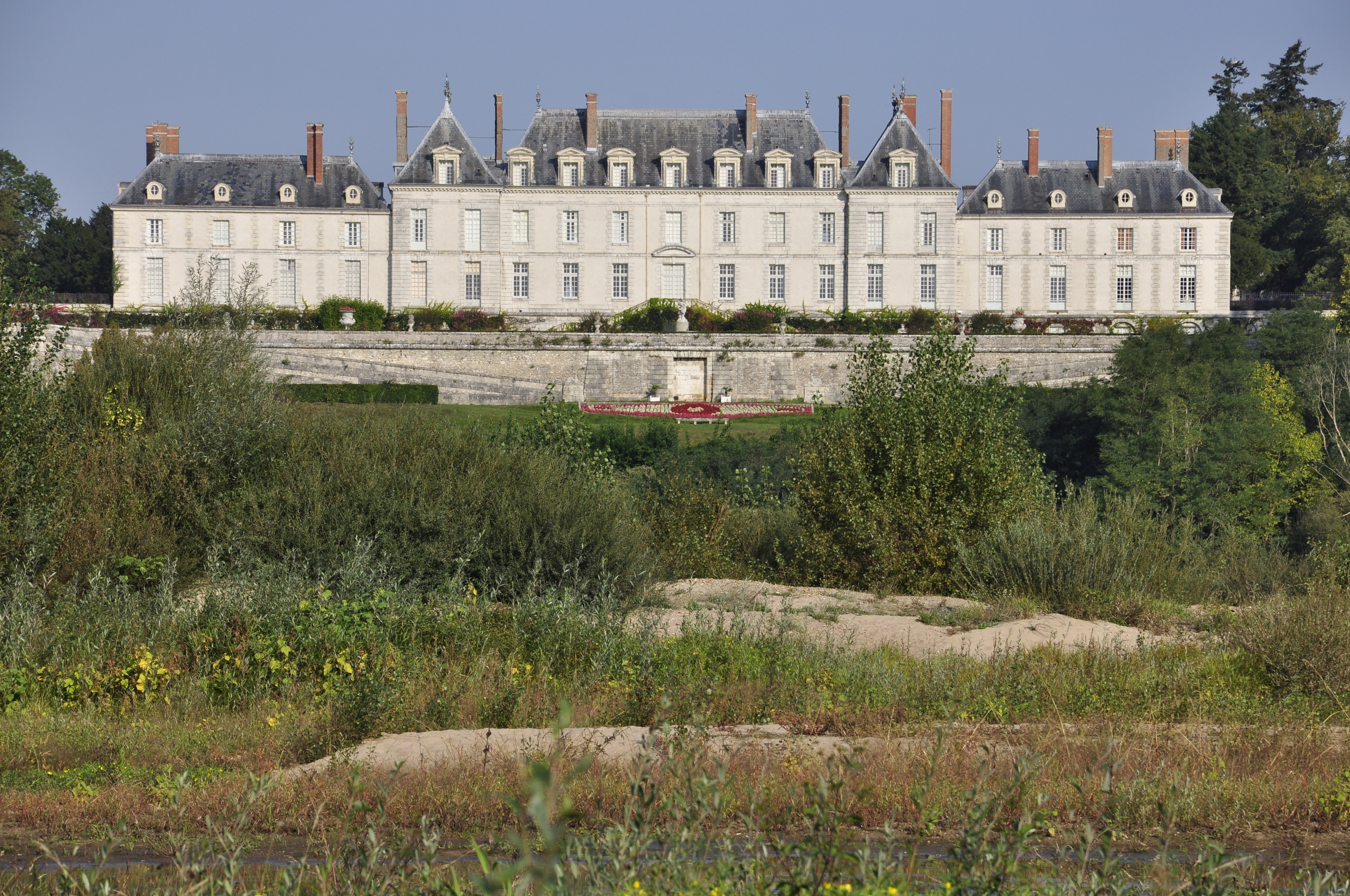 Chateau de Menars, le long de la Loire entre Blois et St-dyé-sur-Loire, France, 41 .